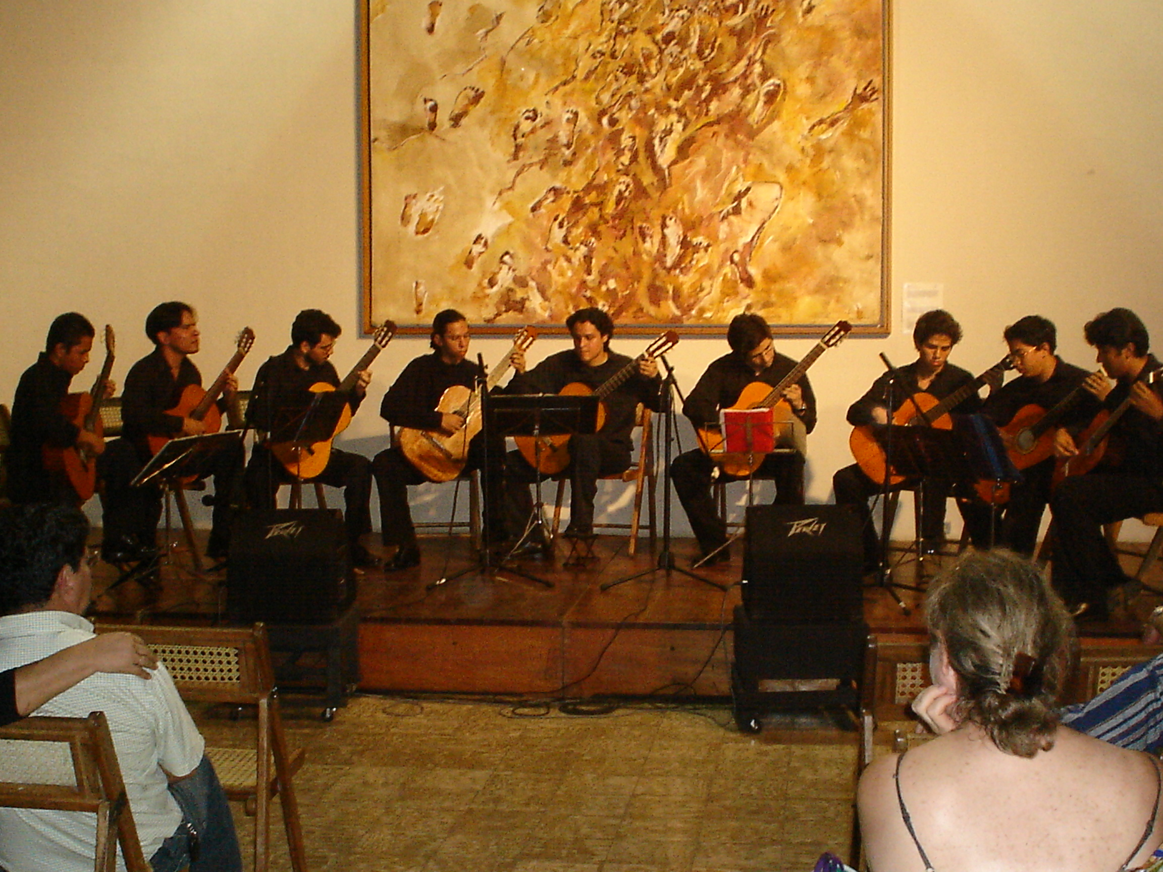 orquesta armando morales granada nicaragua